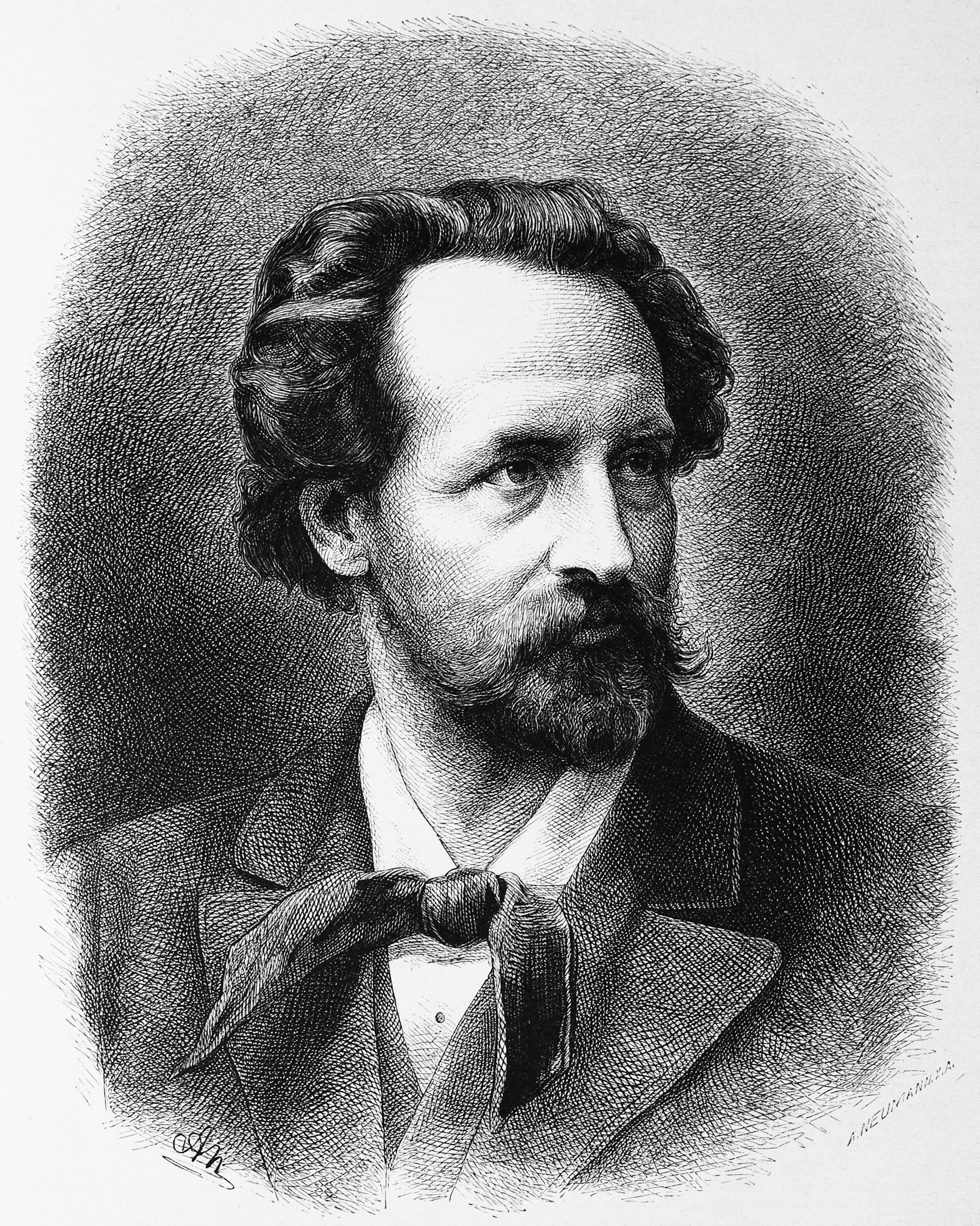 Zeichnung von Adolf von Wilbrandt